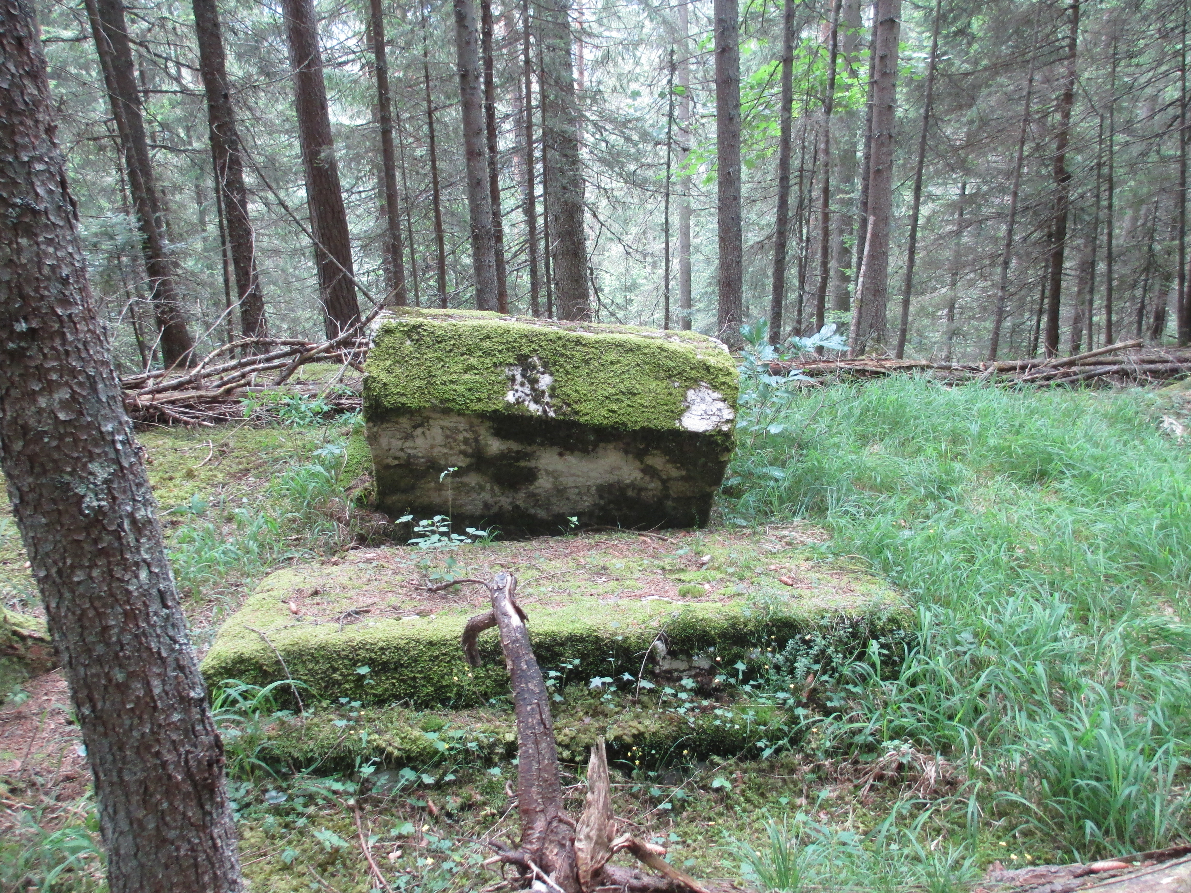 Тврђава Пошијак